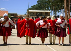 Hobres bailando sicus